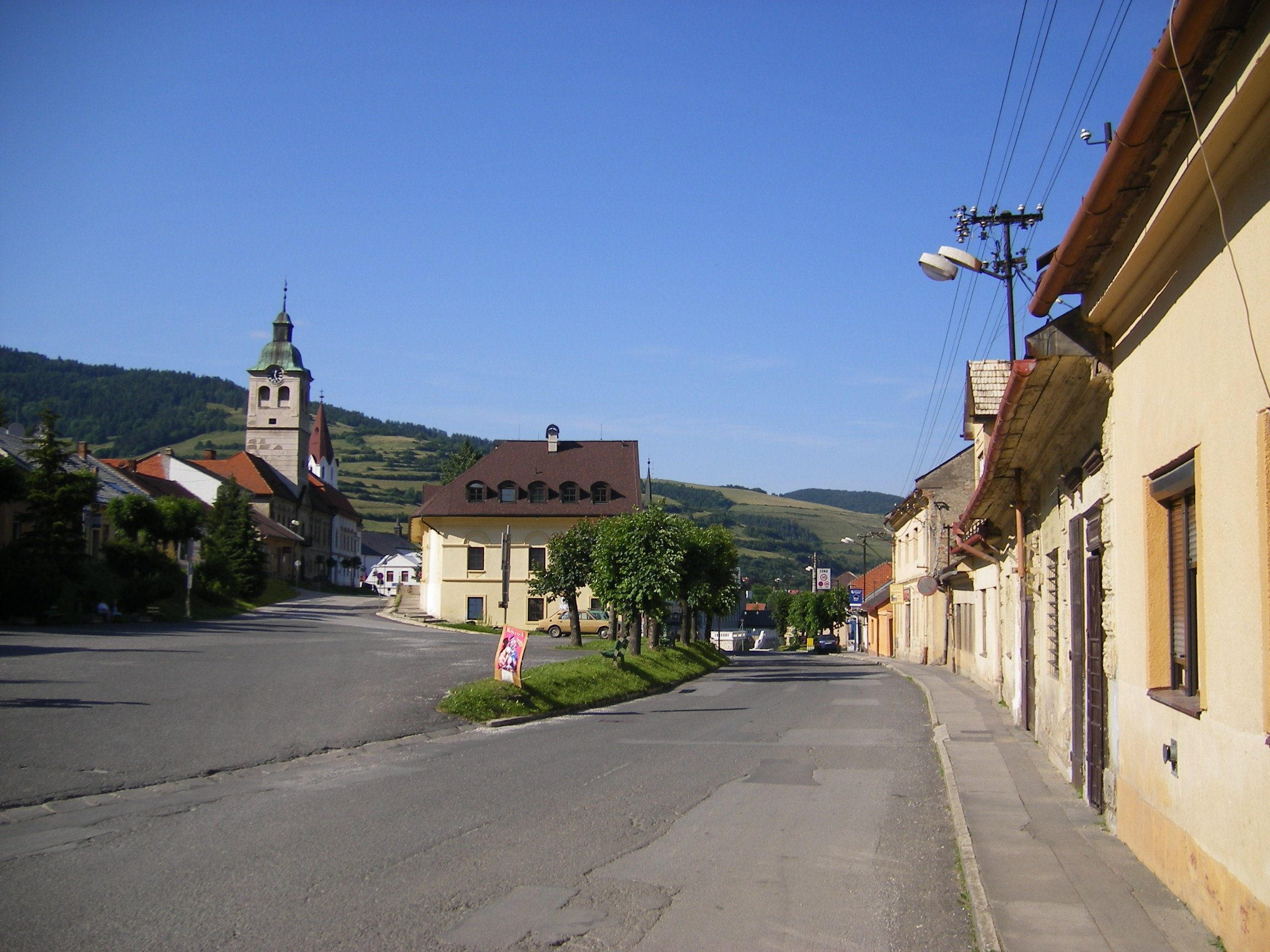 Gelnica, Main Square